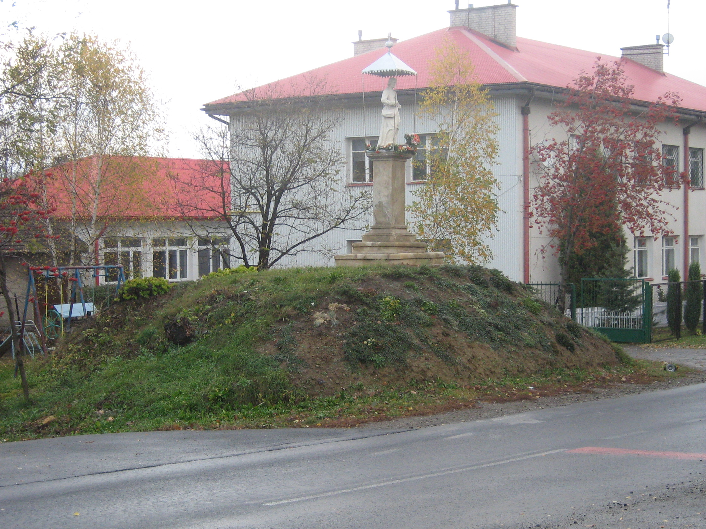 Szwedzka Mogiła w Racławicach "Kurchan"